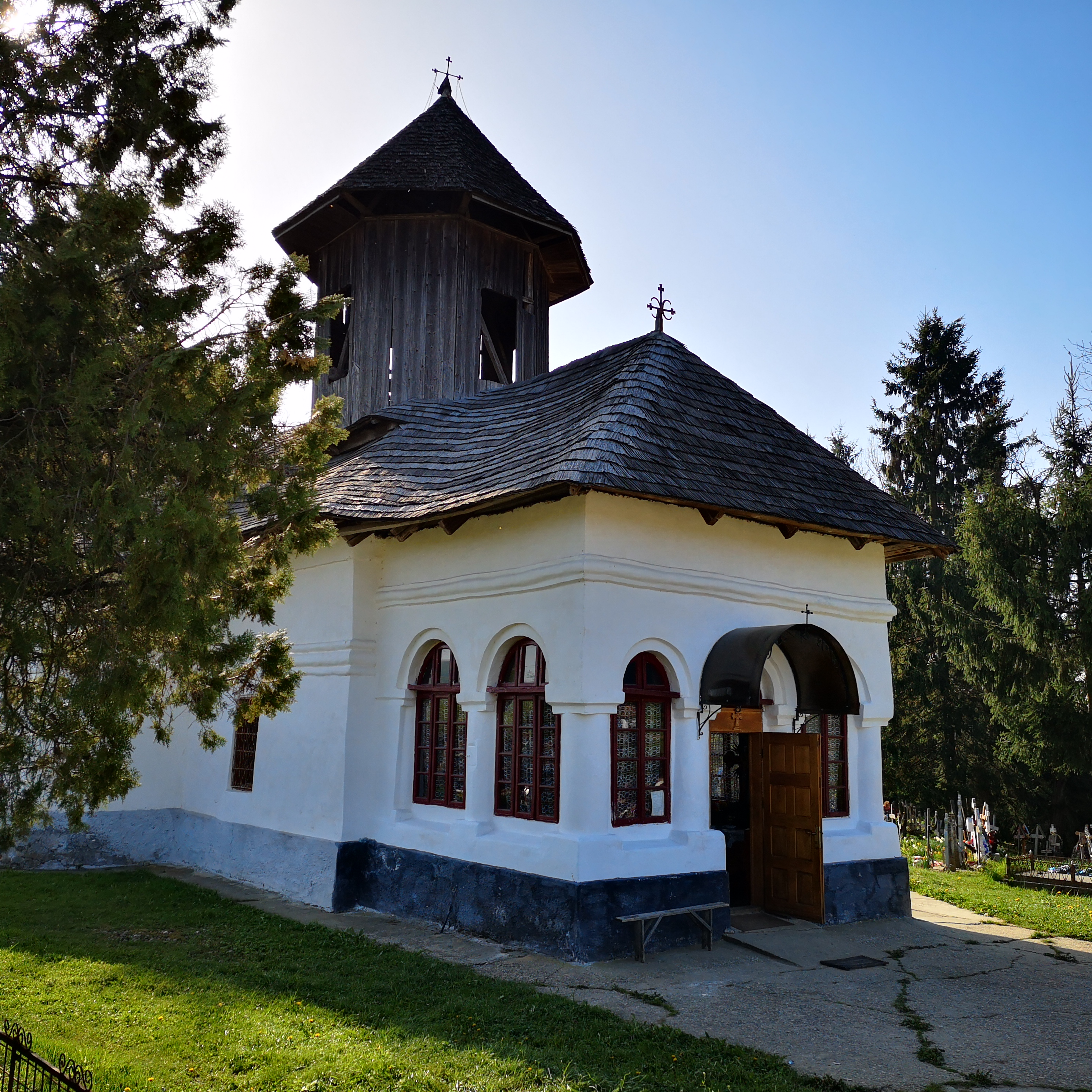 Biserica „Sf. Nicolae”